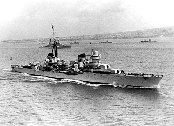 Destructor italià Eugenio di Savoia (1936-1973)